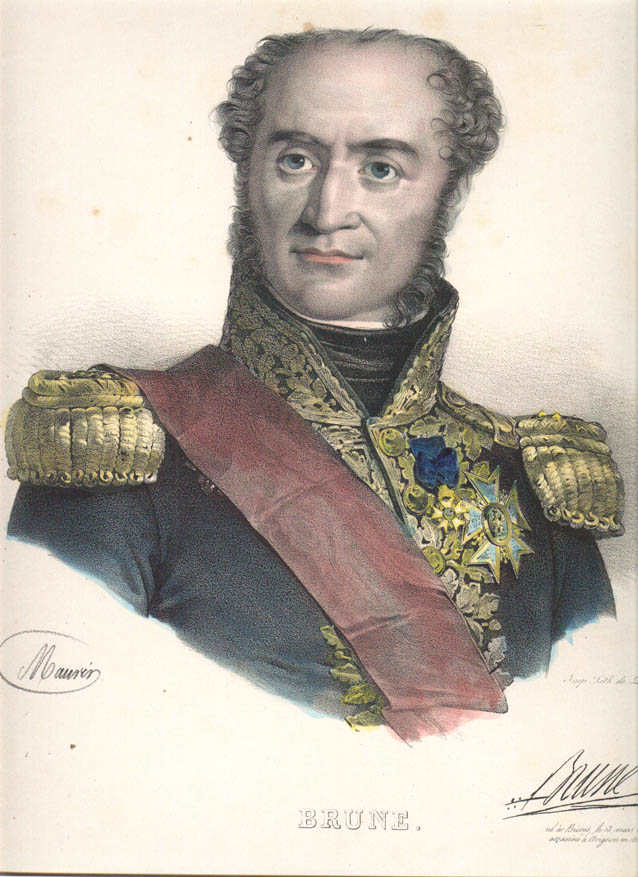 Guillaume Marie-Anne Brune, Napoleonic Marshal